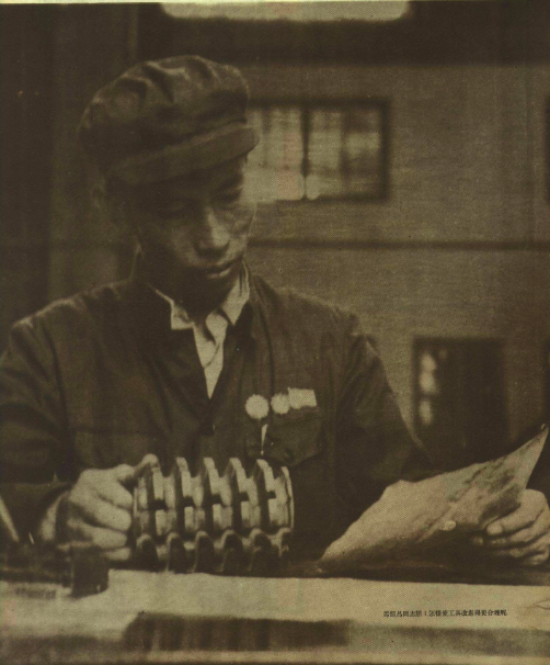 195103 马恒昌